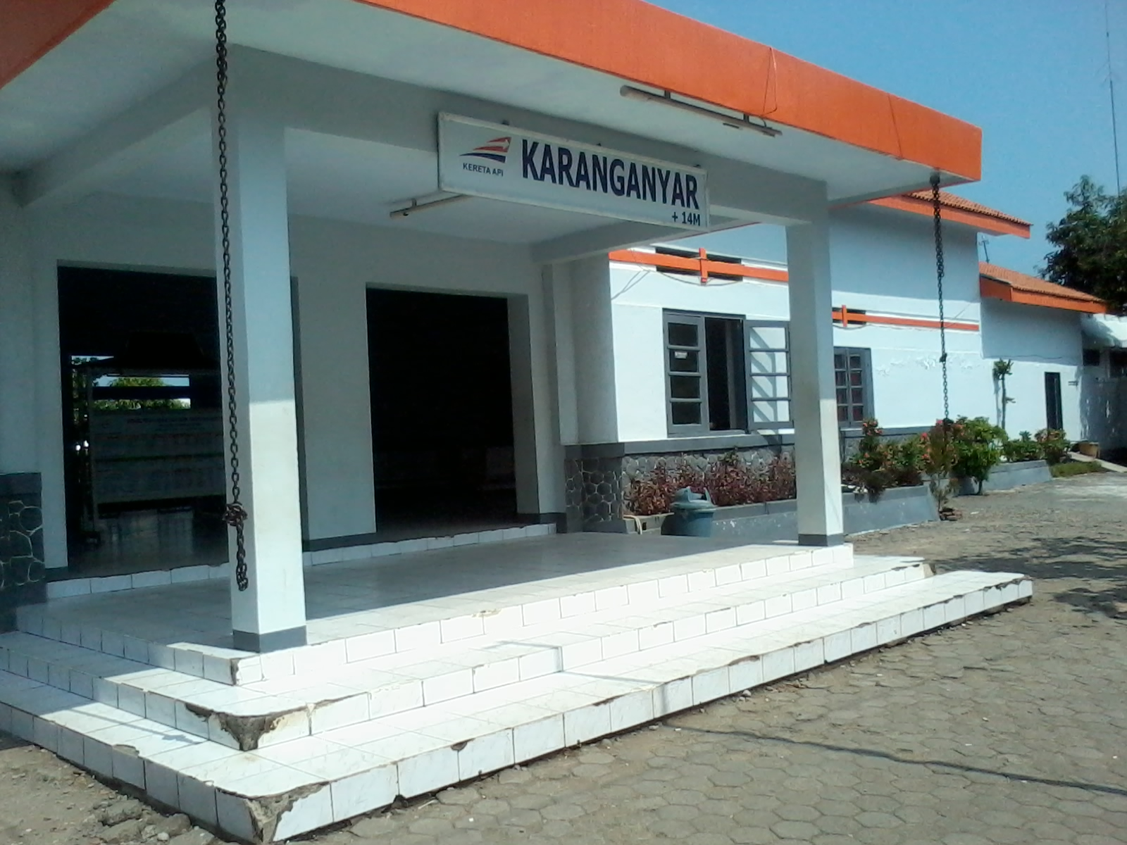 Stasiun Karanganyar sebagai sarana kota ini.